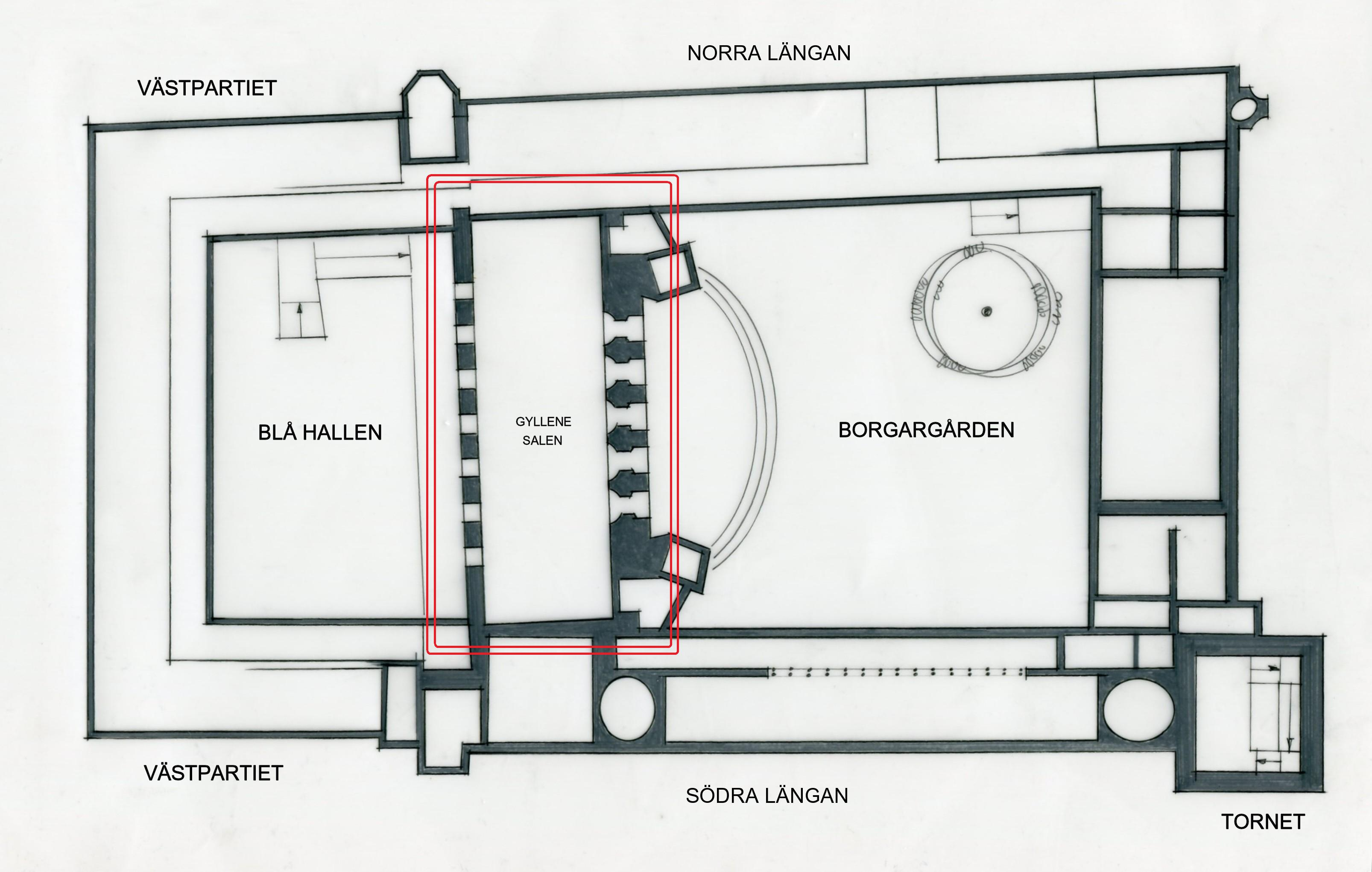 Stockholms stadshus översiktsplan våning 1 trappa, Gyllene salen